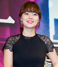 인현왕후의 남자 제작발표회